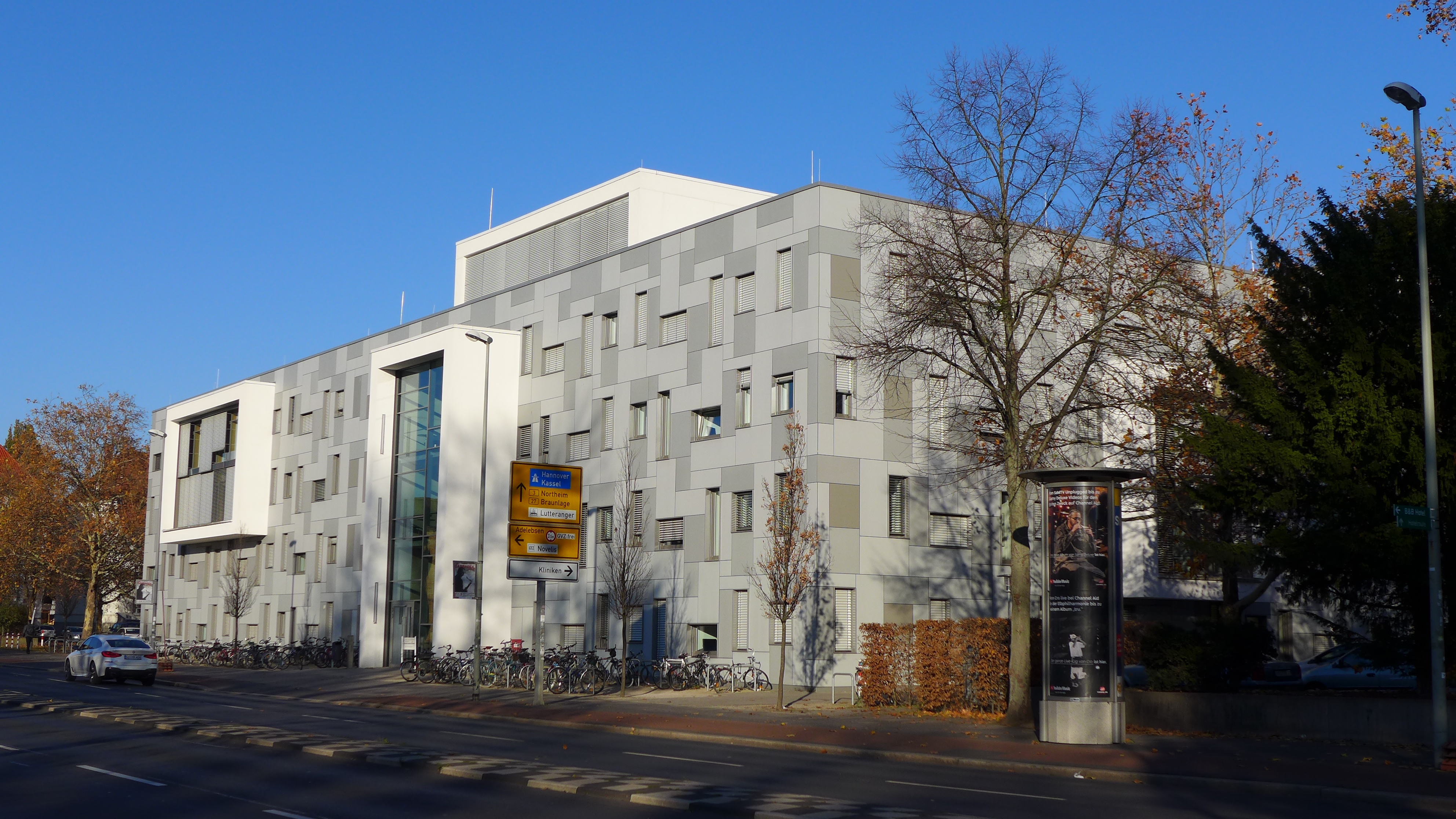 Platz der Göttinger Sieben 3a